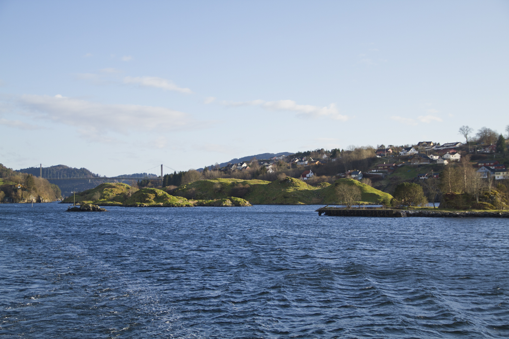 Alversundet, Lindås, Hordaland, Norway